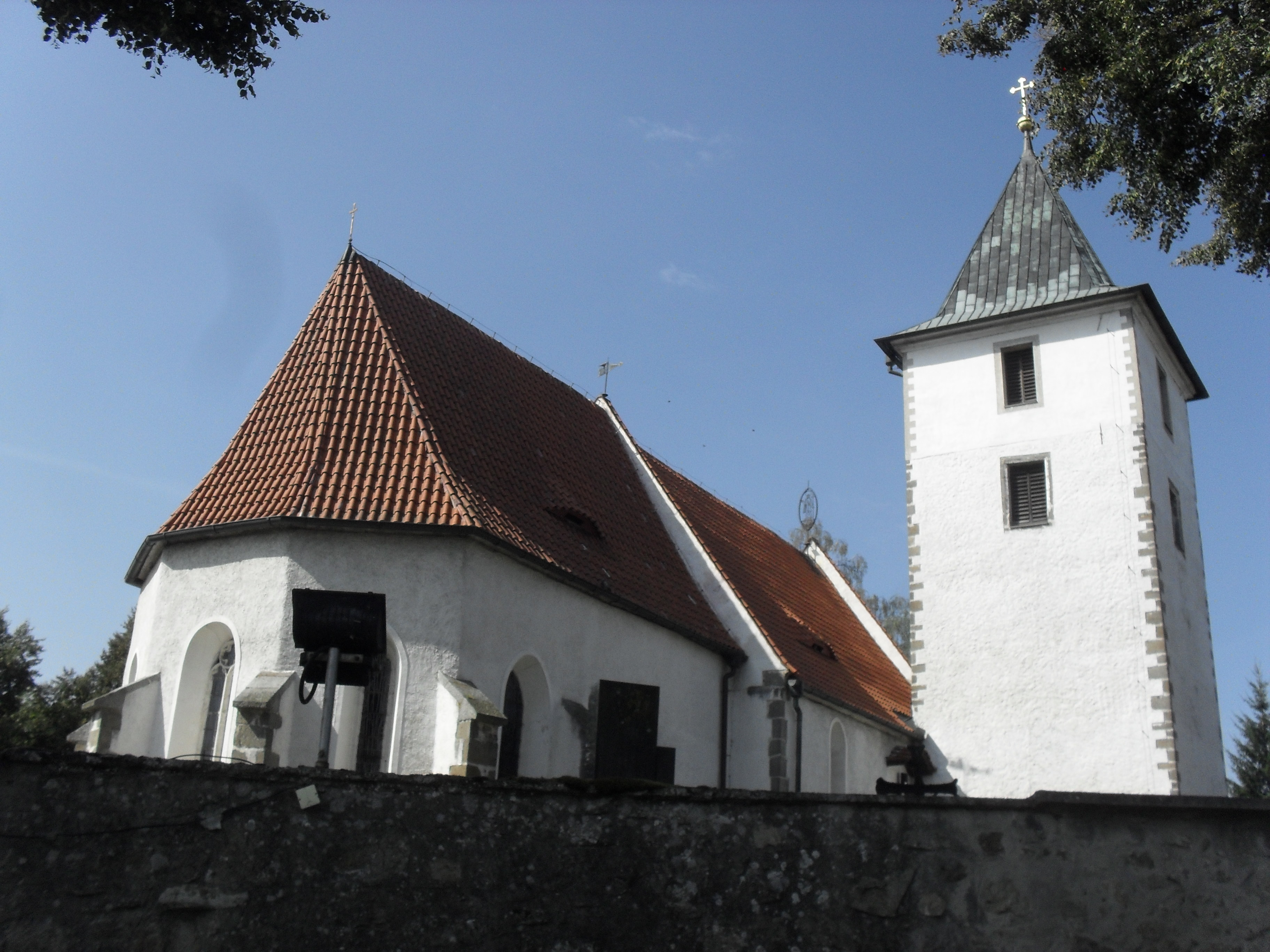 Fotografie pořízena v obci Velký Bor.